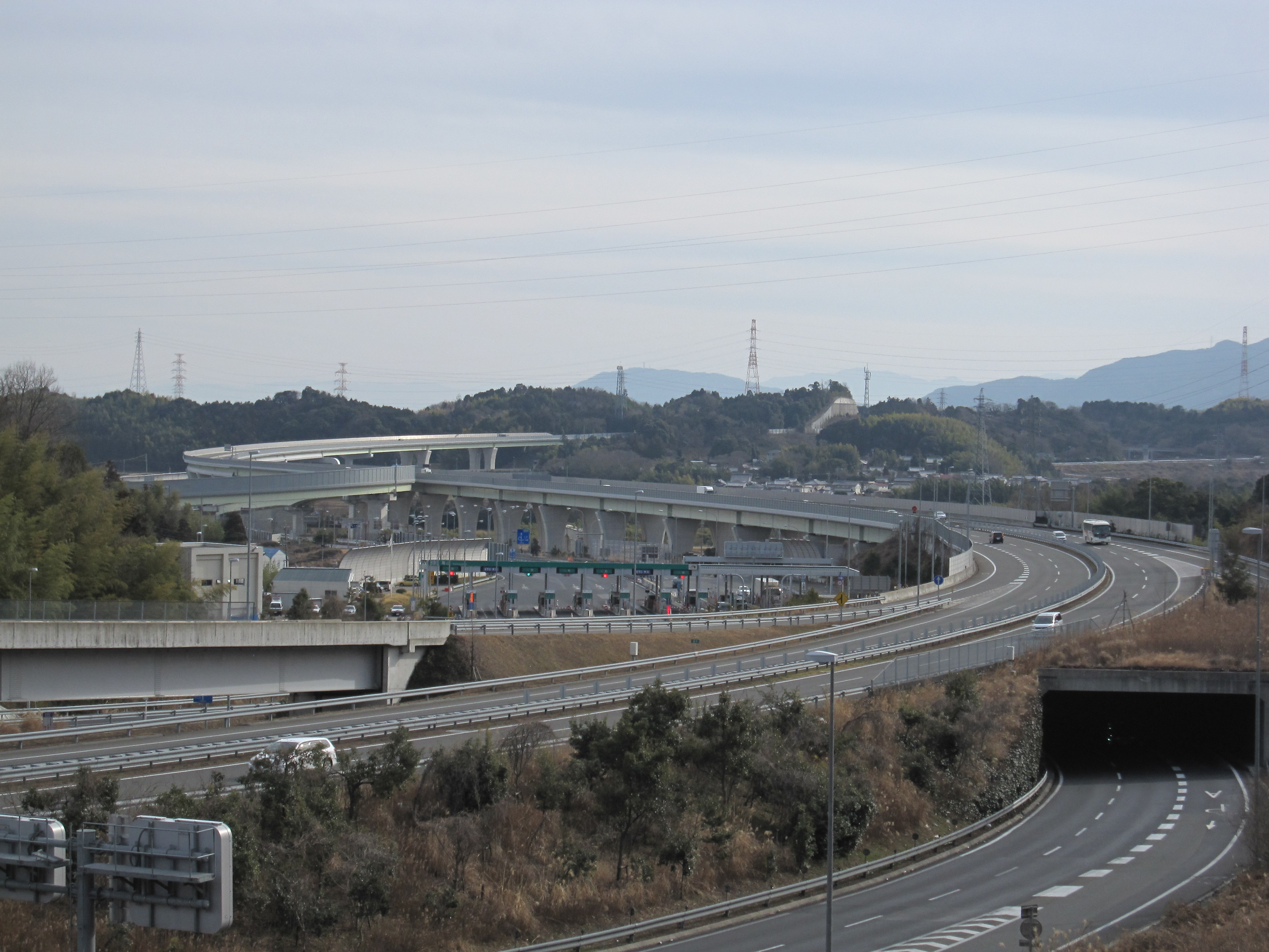 亀山IC料金所と亀山直結線